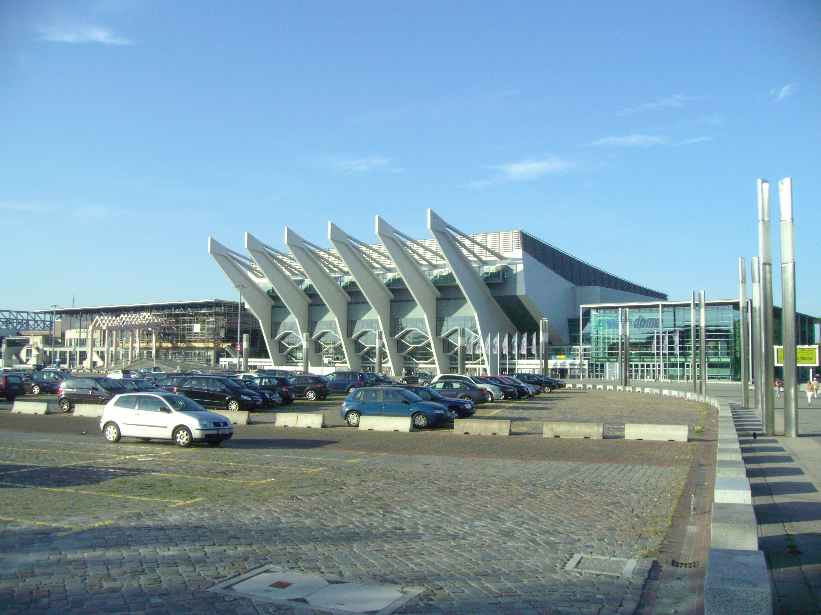 AWD-Dome, Blick von der Bürgerweide aus